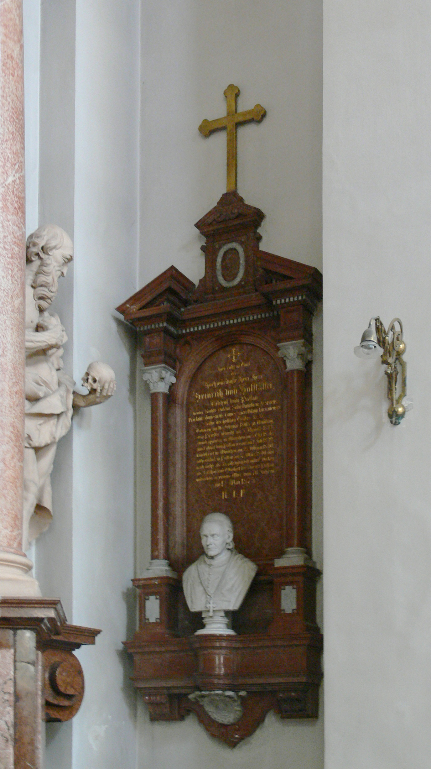 Passau, Dom St. Stephan Grabdenkmal des Bischofs Heinrich von Hofstätter